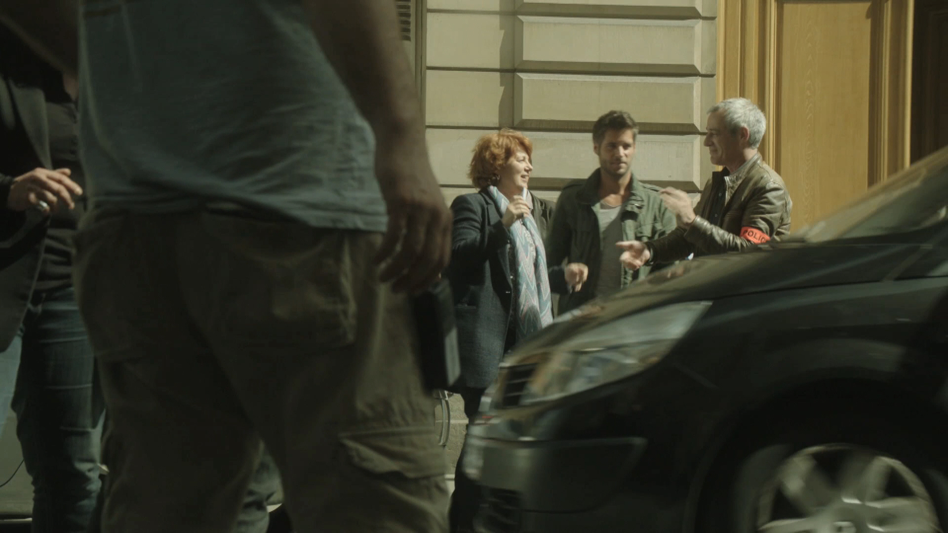 Véronique Genest, Guillaume Gabriel et Alex Waltz. Clap de fin du 101ème et dernier épisode de la série "Julie Lescaut" (réalisé par René Manzor)